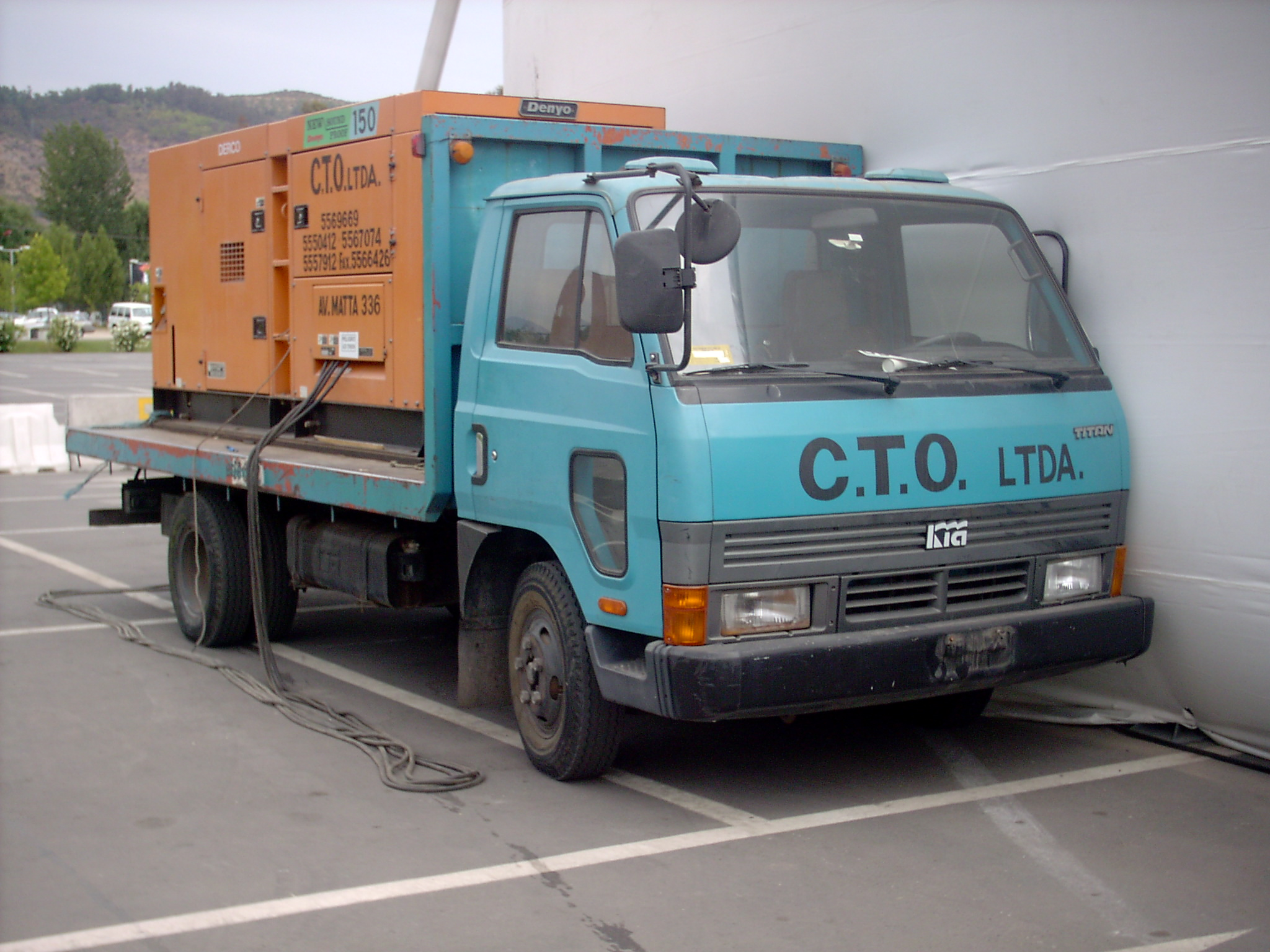 Kia Titan 1996